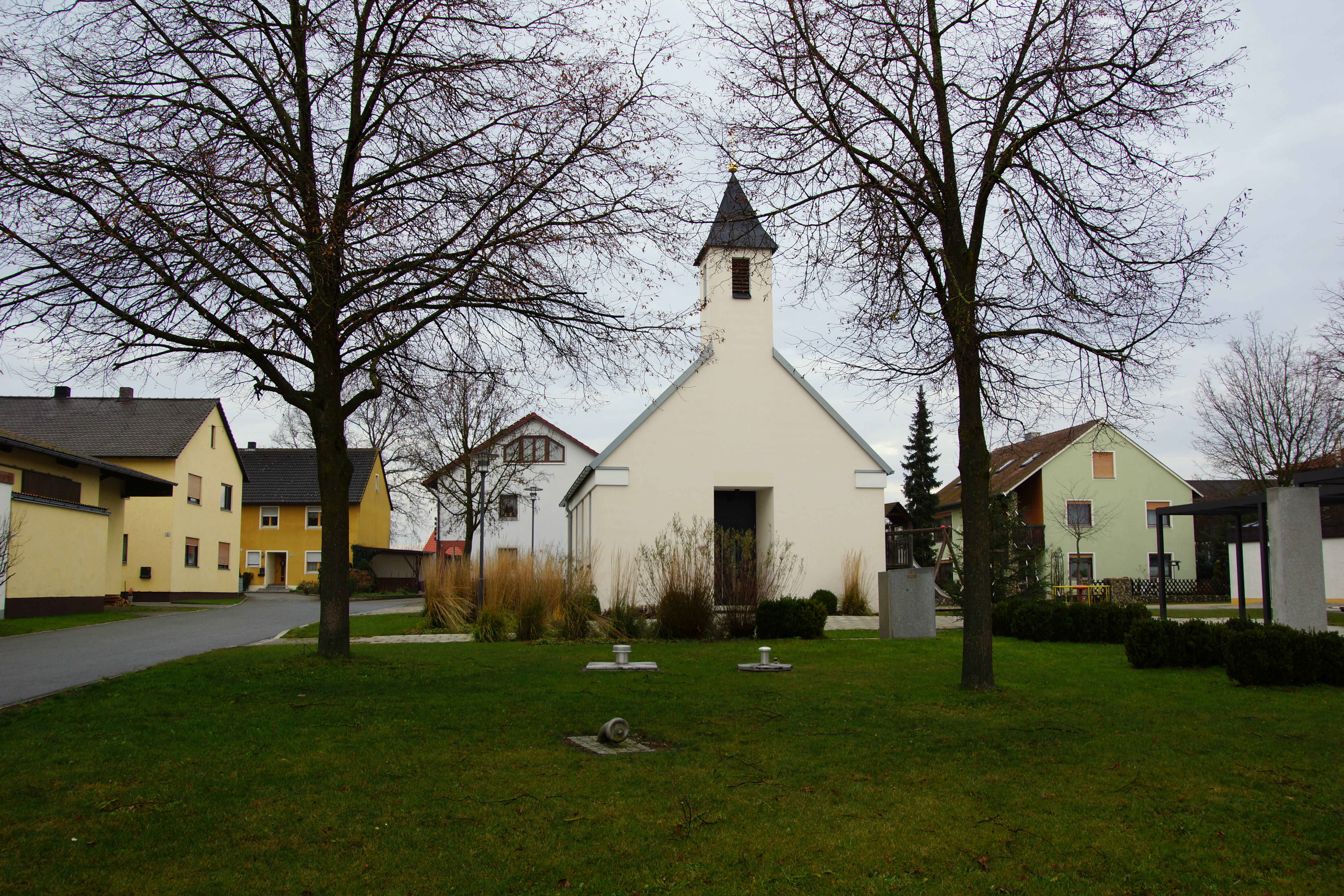 Die Sebastiani-Kapelle in Forst bei Neumarkt in der Oberpfalz